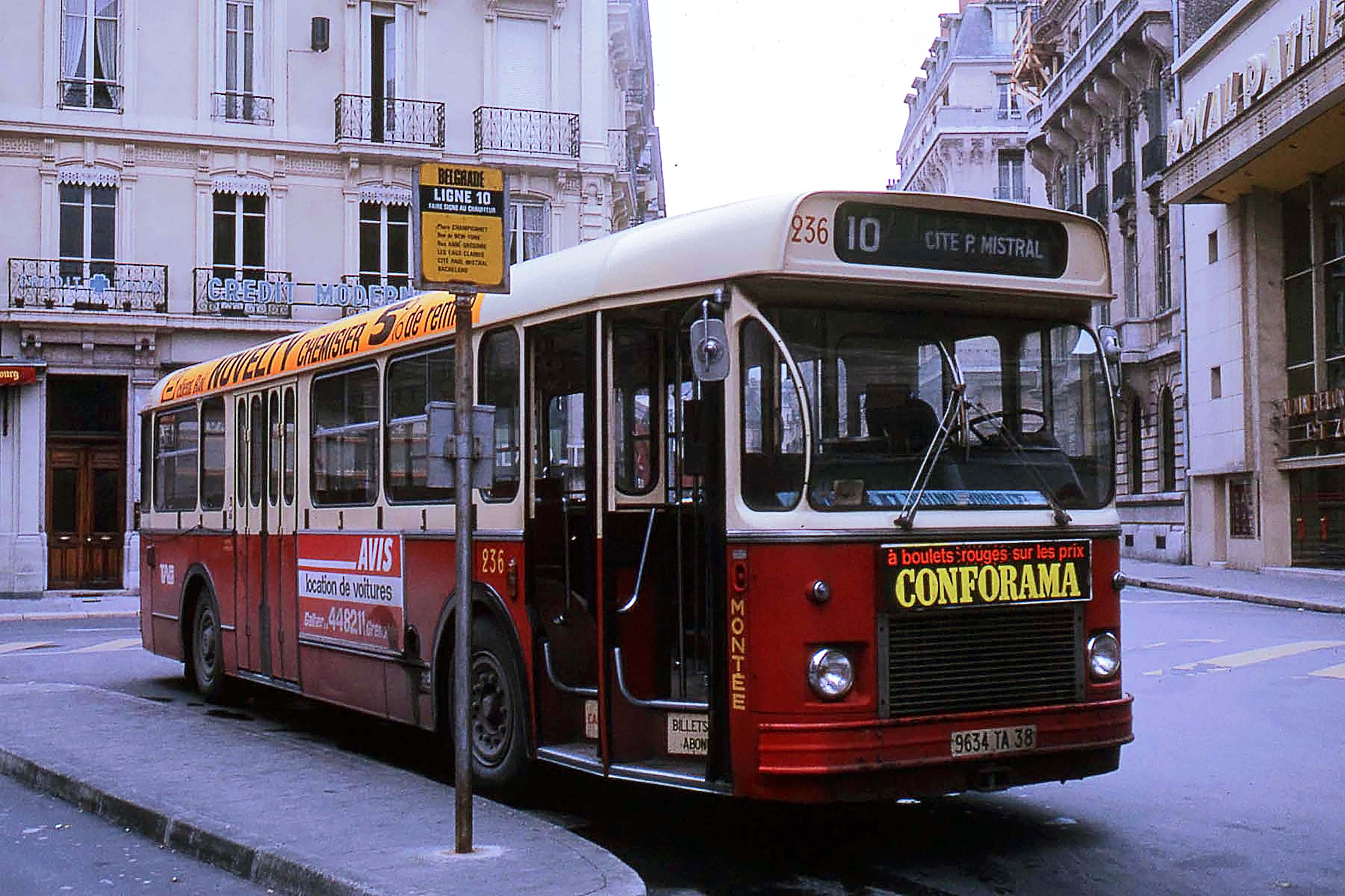 Un Saviem SC 10 grenoblois rue de Belgrade, en 1975.